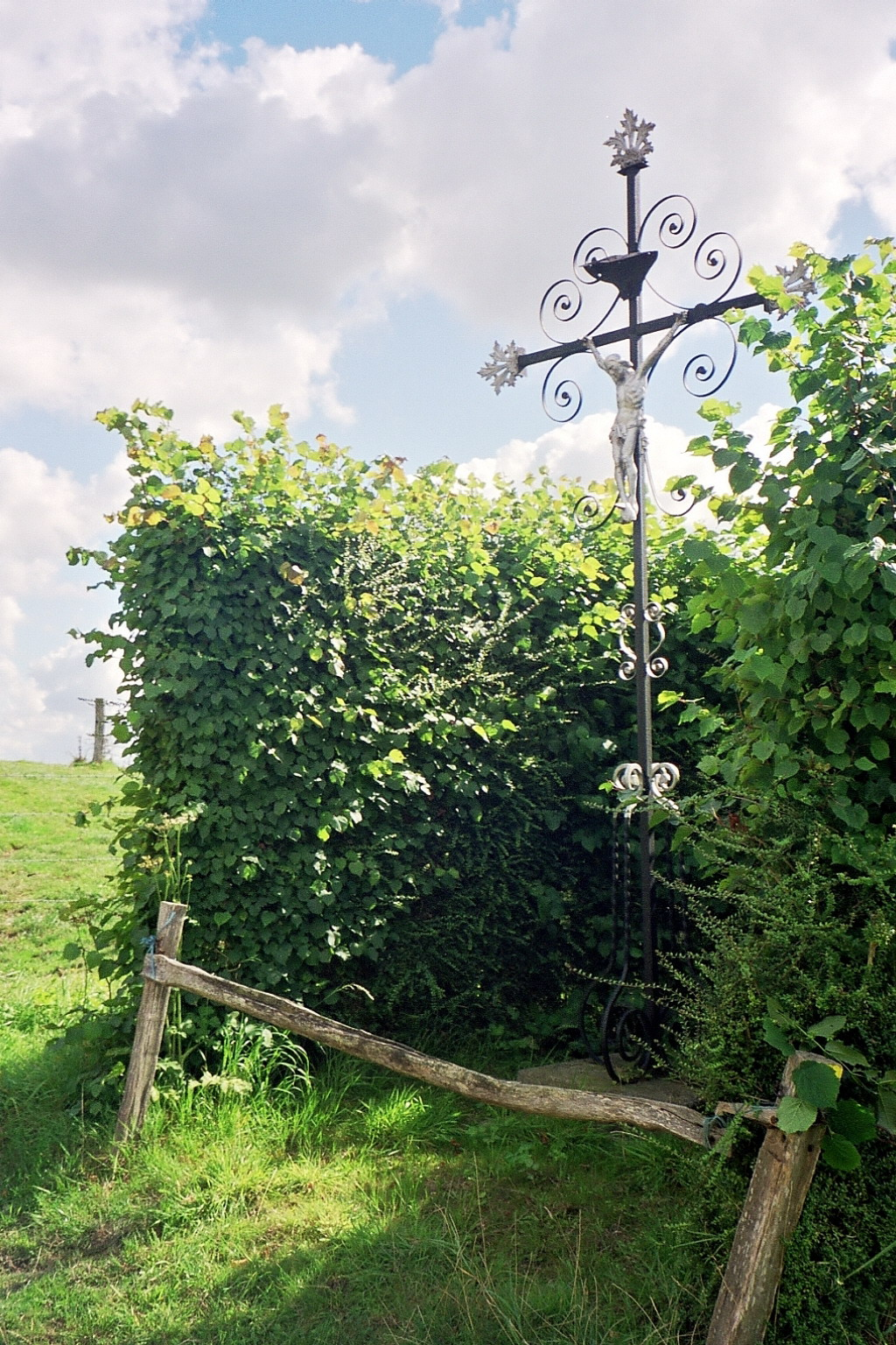 Marque l'entrée de la " cavée" qui sépare à Millebosc les prés de bord de route des champs.